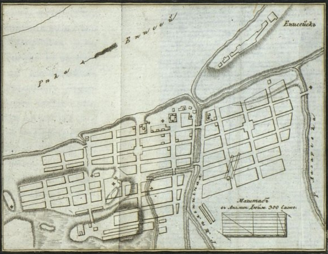 Карта города Енисейск, 1831 год